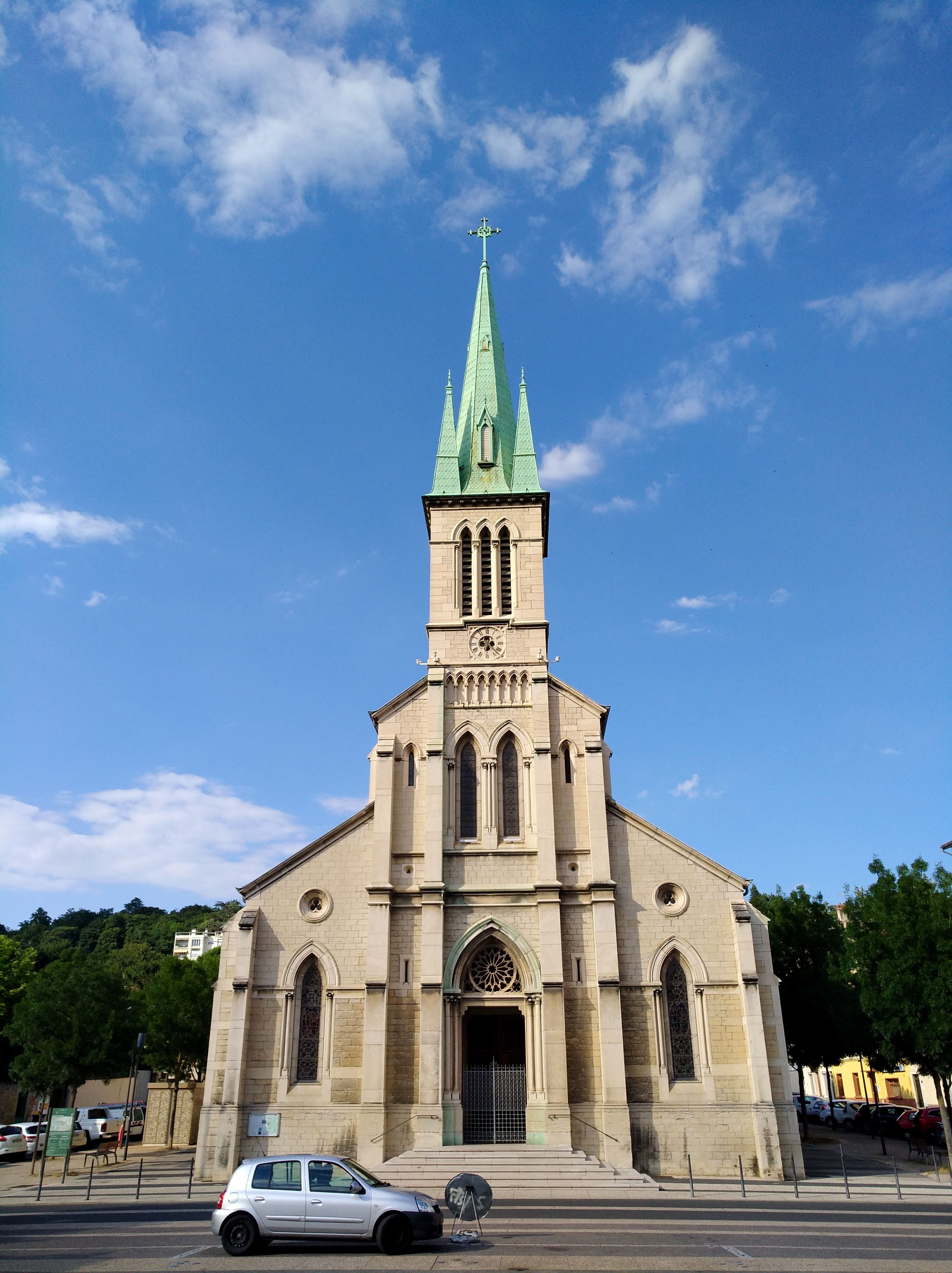 Vue de face de l'église Saint-Louis de Fontaines-sur-Saône (Rhône, France).